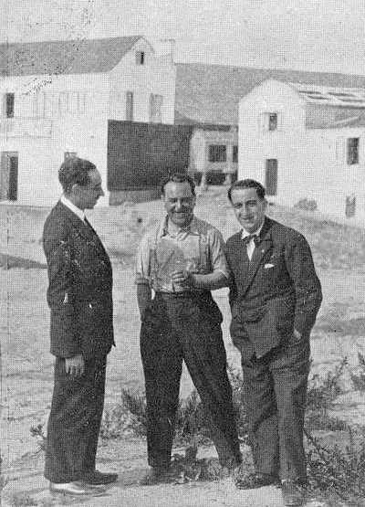 José Signo, Luís Casado e Federico Rivas en Bueu, fotografía en Vida Gallega 1927